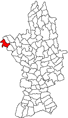 Categorie:Hărţi ale judeţului Olt